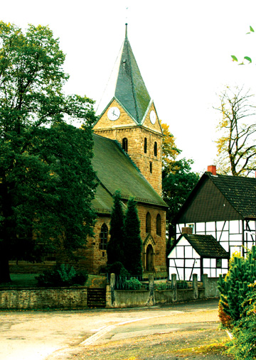 St.-Johann-Baptist-Kirche in Dortmund-Brechten. 1250 wurde die Kirche als dreischiffige, zweijochige Halle auf fast quadratischen Grundriss mit rechteckigen Chor errichtet. Der Westturm ist wahrscheinlich älterem Datums. Um das Jahr 1500 wurde die Sakristei erbaut. Bei der Restaurierung des Innenraum 1960/1962 wurden umfangreiche Malereien aus der Entstehungszeit der Kirche freigelegt und restauriert. Der Taufstein stammt aus dem 13. Jahrhundert, Kanzel und Altar sind aus dem 17. Jahrhundert.